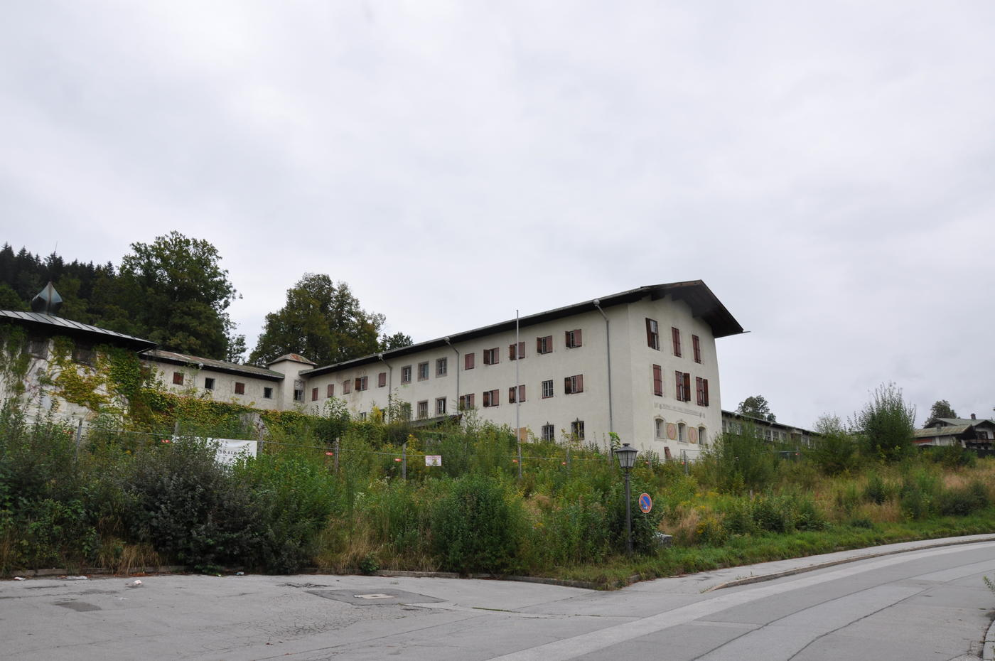 Ehemalige Kurklinik in der Stanggaß, Gemeinde Bischofswiesen.